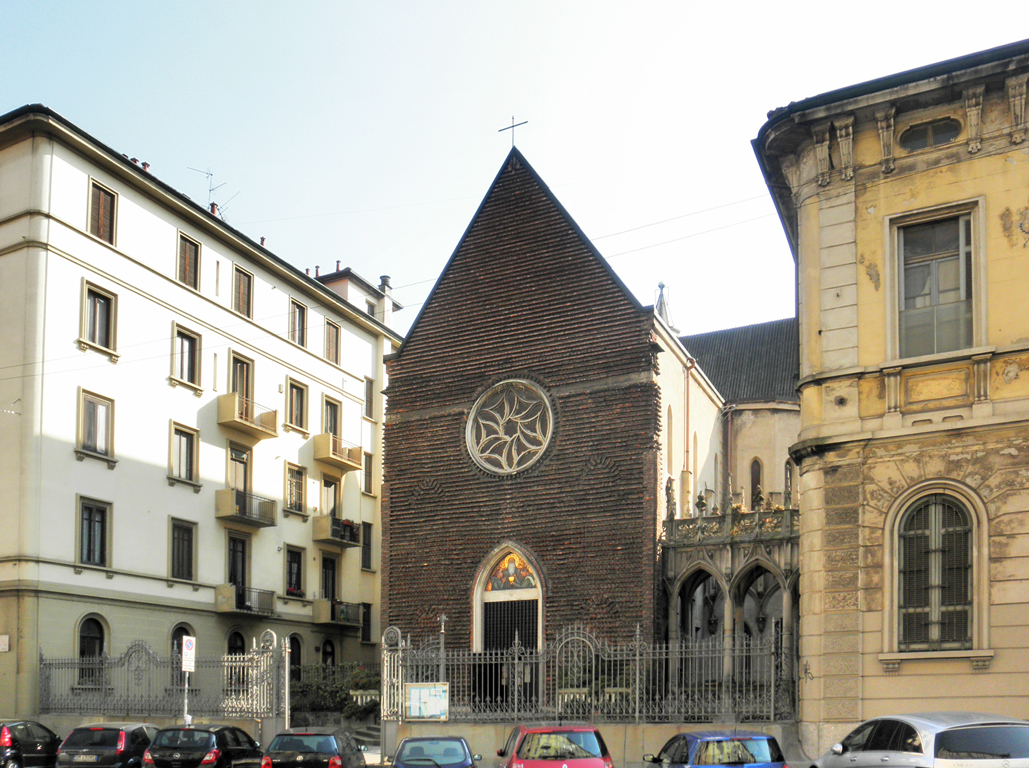 Milano, monastero di San Benedetto. La chiesa.